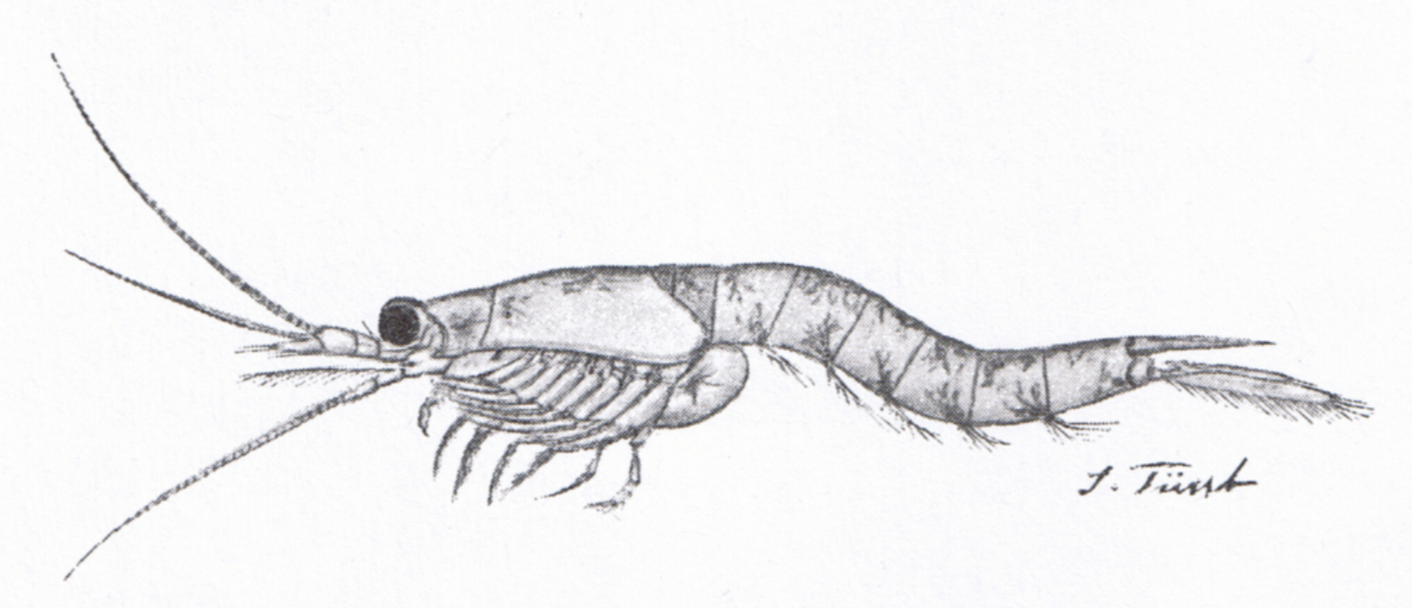 Brackwasserkrebs, Spaltfußkrabbe (Mysis vulgaris), Zeichnung von Julius Fürst um 1895